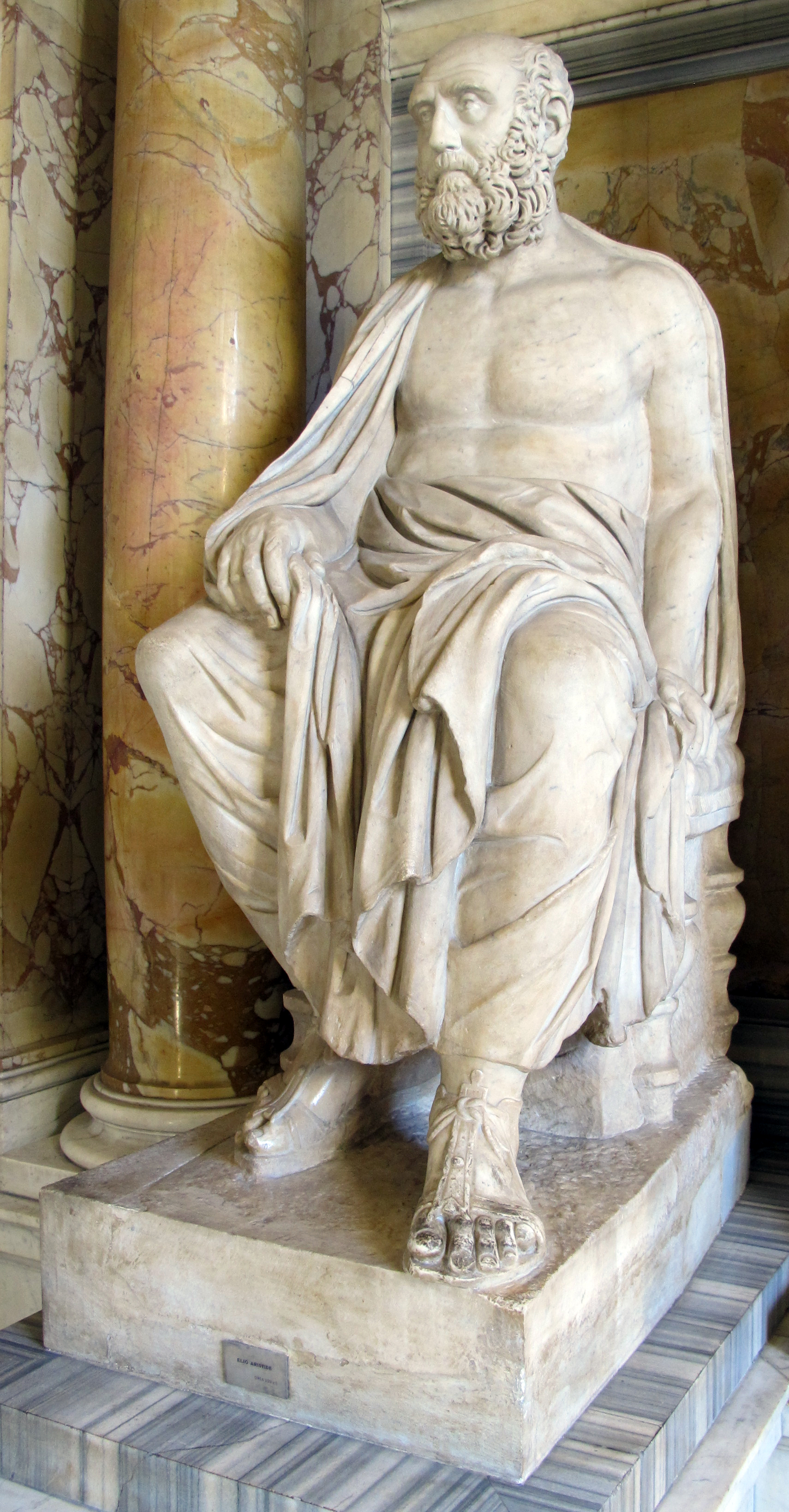 Arte romana nei Musei Vaticani